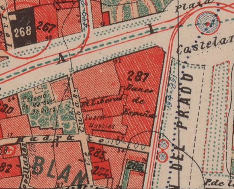 Hoja 3 del Plano de Madrid en 1900, dibujado por Facundo Cañada. Descripción física del plano total por el autor: "El plano consta de 6 hojas, cada una de las cuales mide 59 cm de altura por 72 cm de ancho (de trabajo, por supuesto, nada de anchos de cenefas), y, por lo tanto, al unirlas forman un plano que mide 1,44 metros de ancho y 1,77 de alto y las márgenes en blanco: se está tirando escrupulosamente en ocho colores y en superior papel, hallándose perfectamente grabado" (Facundo Cañada López, 1900). Descripción cartográfica del plato total: Plano de Madrid y Pueblos colindantes de Aravaca, Canillas, Canillejas, Carabanchel Alto, Carabanchel Bajo, Chamartín, El Pardo (Real Sitio), Fuencarral, Getafe, Hortaleza, Leganés, Pozuelo de Alarcón, con sus barrios de Húmera y Estación; Vallecas, Vicálvaro, Villaverde, etc, al principiar el siglo XX. El plano va acompañado de una Guía, con el Directorio de Madrid y otras notas aclaratorias. Información estadística y nomenclator del plano por el autor: La superficie del término municipal de Madrid de la época es de 821.189.581 pies cuadrados, equivalentes a 18.621 fanegas del marco de Madrid o sean 6475 hectáreas y 54 áreas; resultando de dicha superficie una proporción de 120,52 metros cuadrados por habitante, pues estos son 528.984, según el último empadronamiento general verificado en 1º de Diciembre de 1900. En el plano se fijan los nombres de las plazas, calles, callejones, cuestas, etc., que en la actualidad tienen, detallándose la numeración que a cada casa corresponde, dentro de cada manzana, pues se fijan los primeros y últimos números de cada una de éstas al principiar las calles, y después los últimos en las manzanas sucesivas, y de esta manera resulta toda la numeración de cada calle.